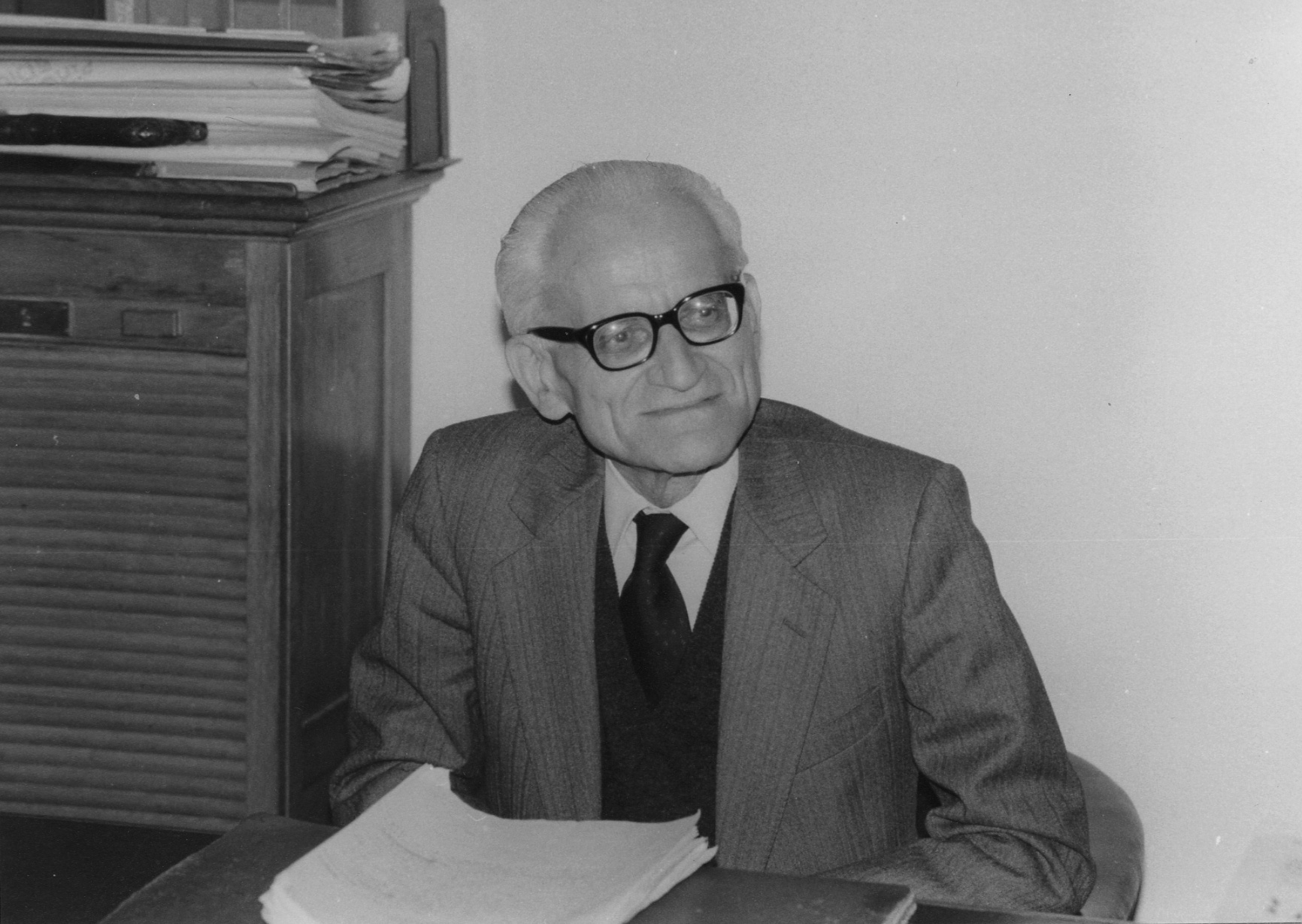 Paolo Biscaretti di Ruffia fotografato nel suo studio (Milano 1986)